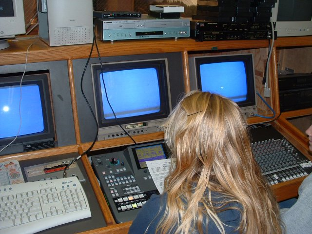 TV-3 control room.